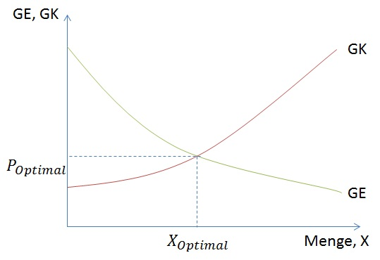 Der Schnittpunkt zwischen Grenzkostenkurve und Grenzerlöskurve, zeigt bei welcher Menge der Mengenanpasser seinen Ertrag maximieren kann. Eine höhere oder niedrigere Angebotsmenge würde im Modell zu geringeren Erträgen führen.